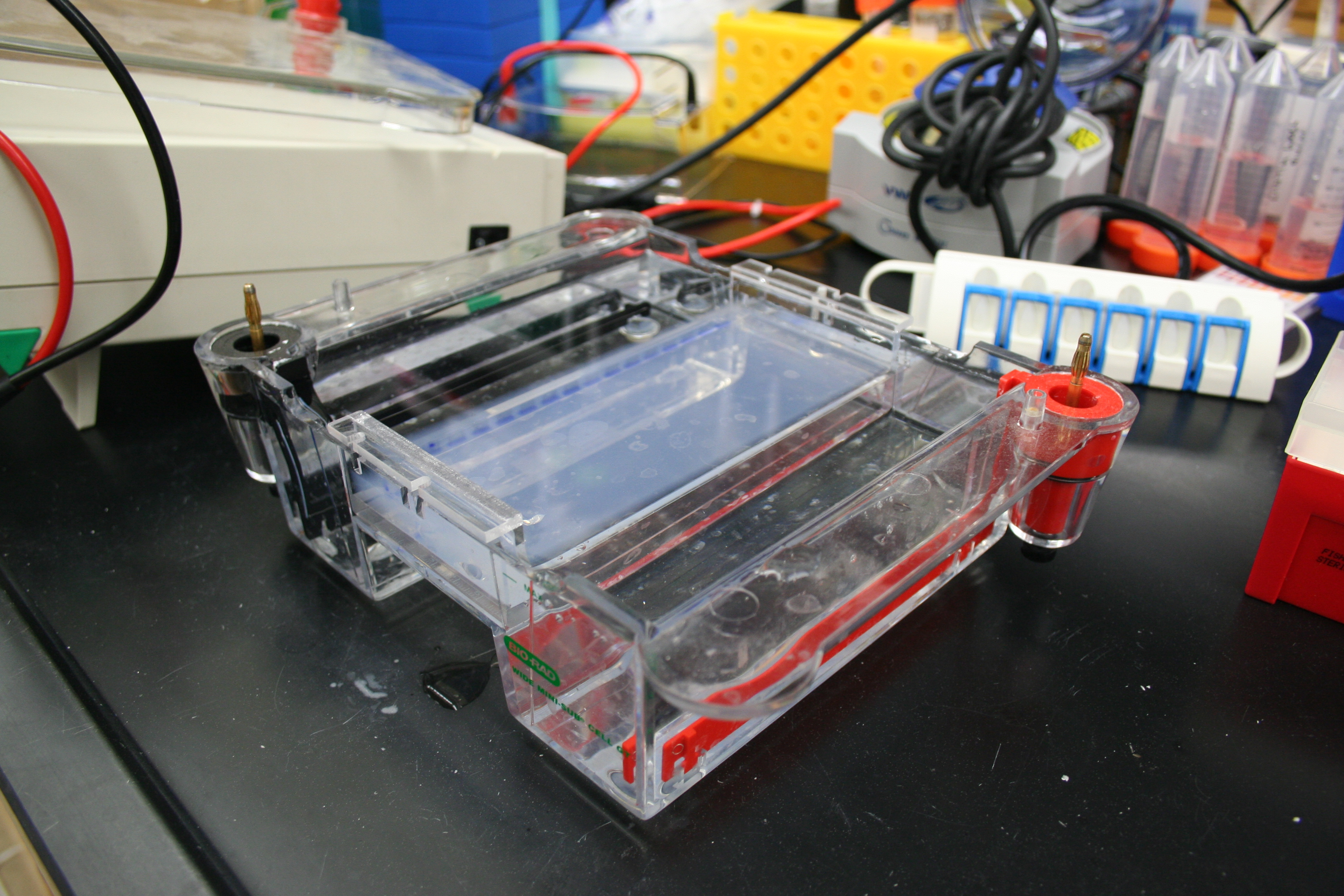 Agarose Gel